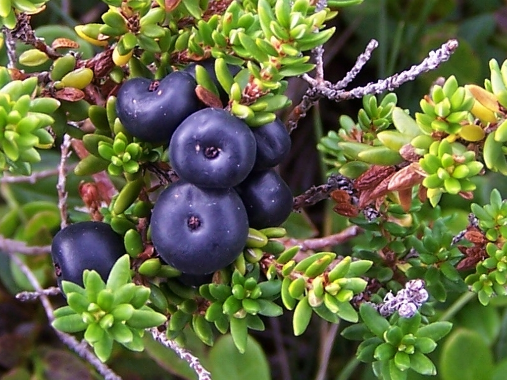 Empetrum nigrum (pl. bażyna czarna), habitat: Tatra Mountains, Grześ